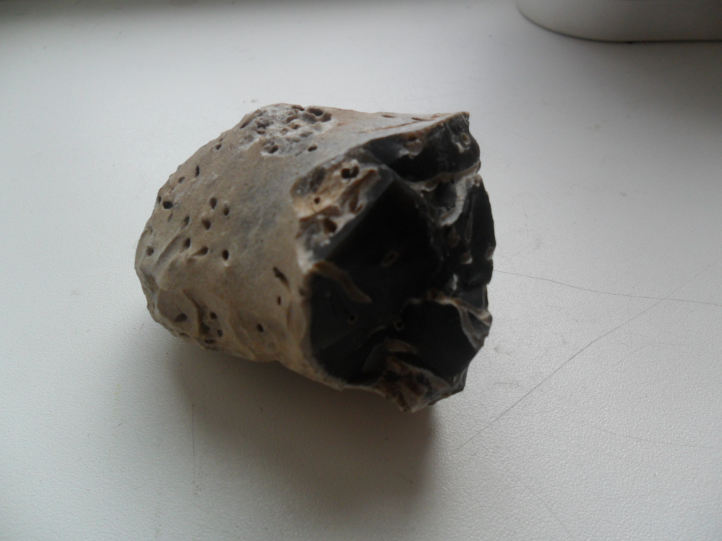 Фотография фрагмента сукремльского кремня, проточенного корнями. С поверхности покрыт слоем белой трёрдой патины.